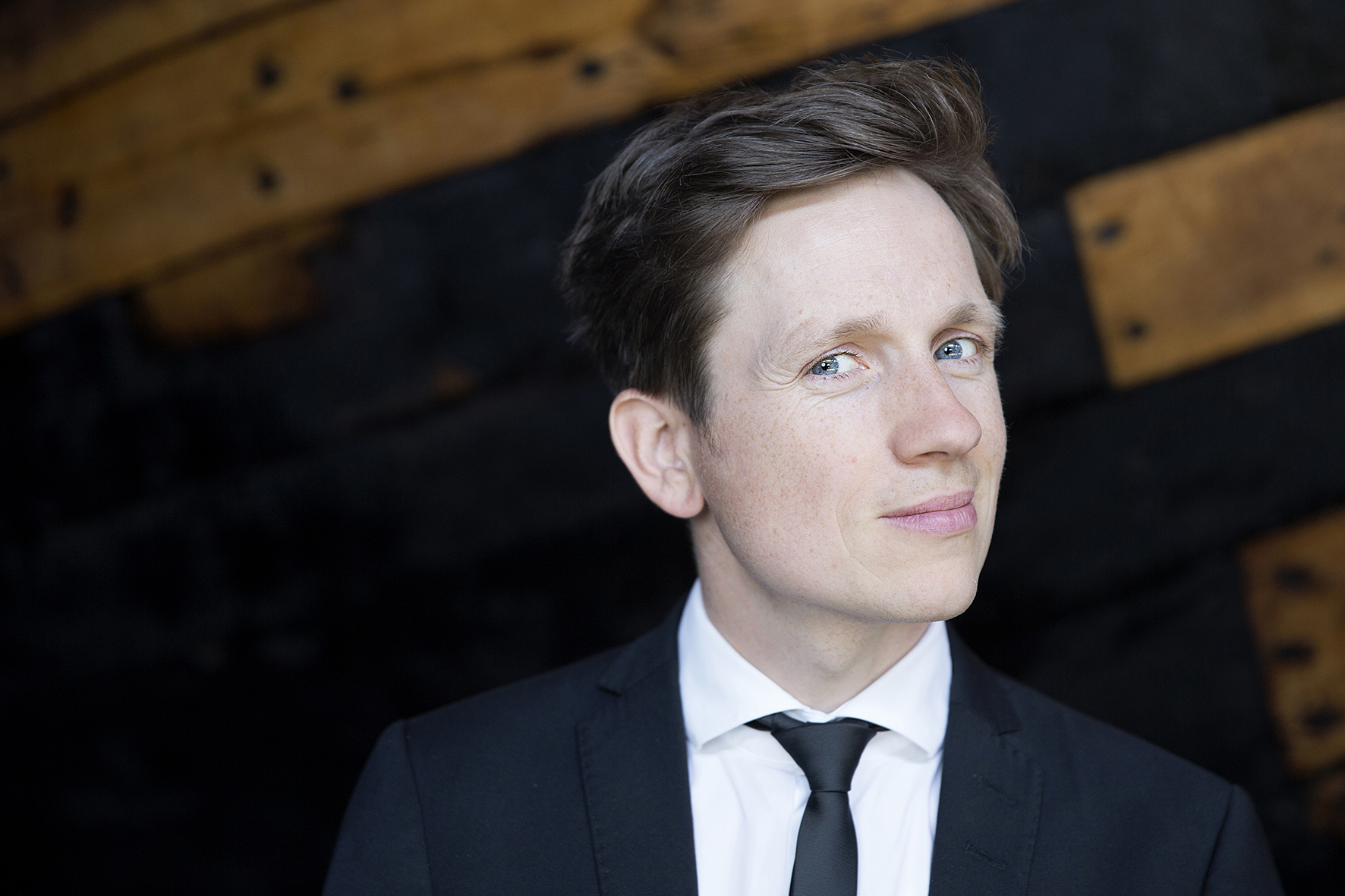 Portrait des Moderators Johannes Büchs